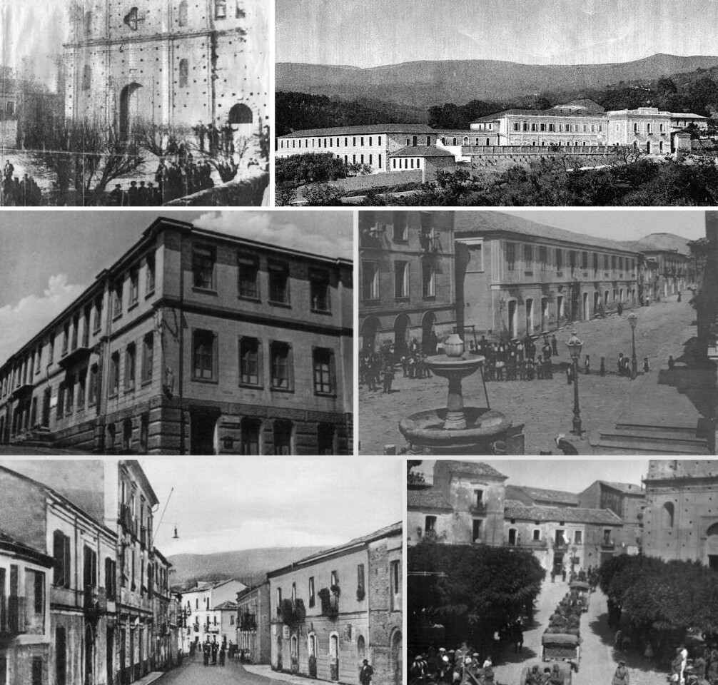 Foto d'epoca di Girifalco tra '800 e inizi del '900: in alto chiesa Matrice e ospedale psichiatrico; al centro municipio e piazza Vittorio Emanuele II; in basso corso Garibaldi e piazza Umberto I attraversata dall'esercito.